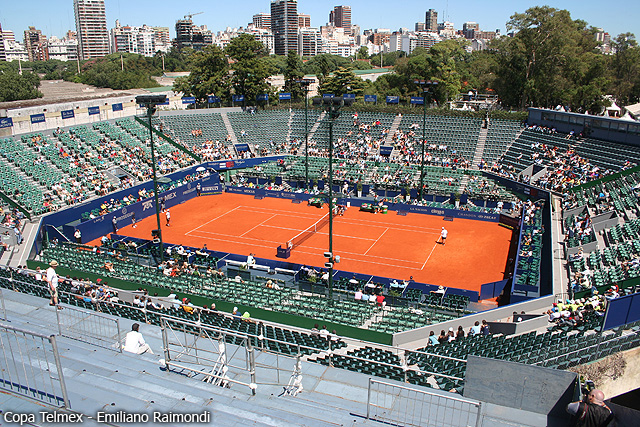 Vista del estadio central del Buenos Aires Lawn Tennis Club.